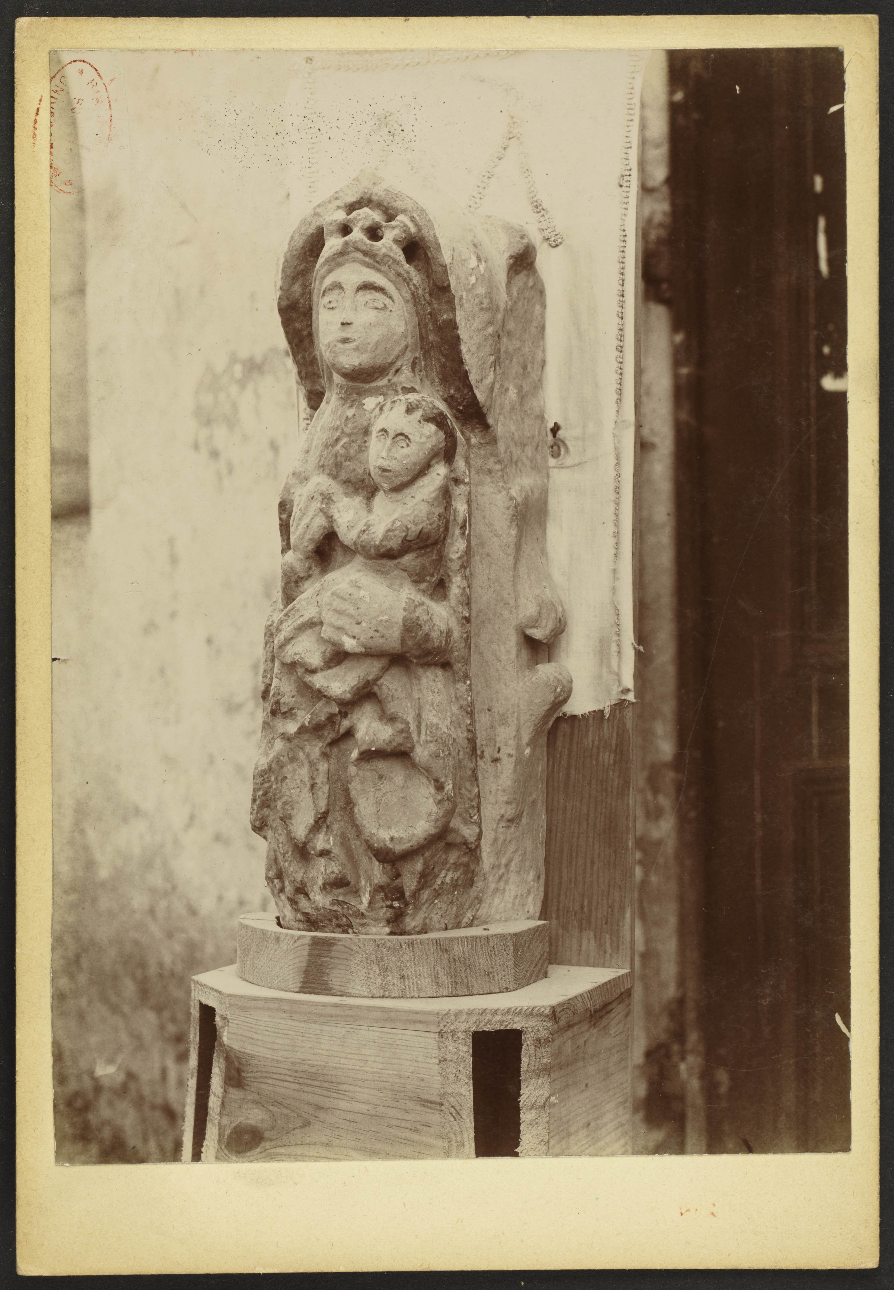 Eglise Notre-Dame de Marcenais; Vierge et enfant